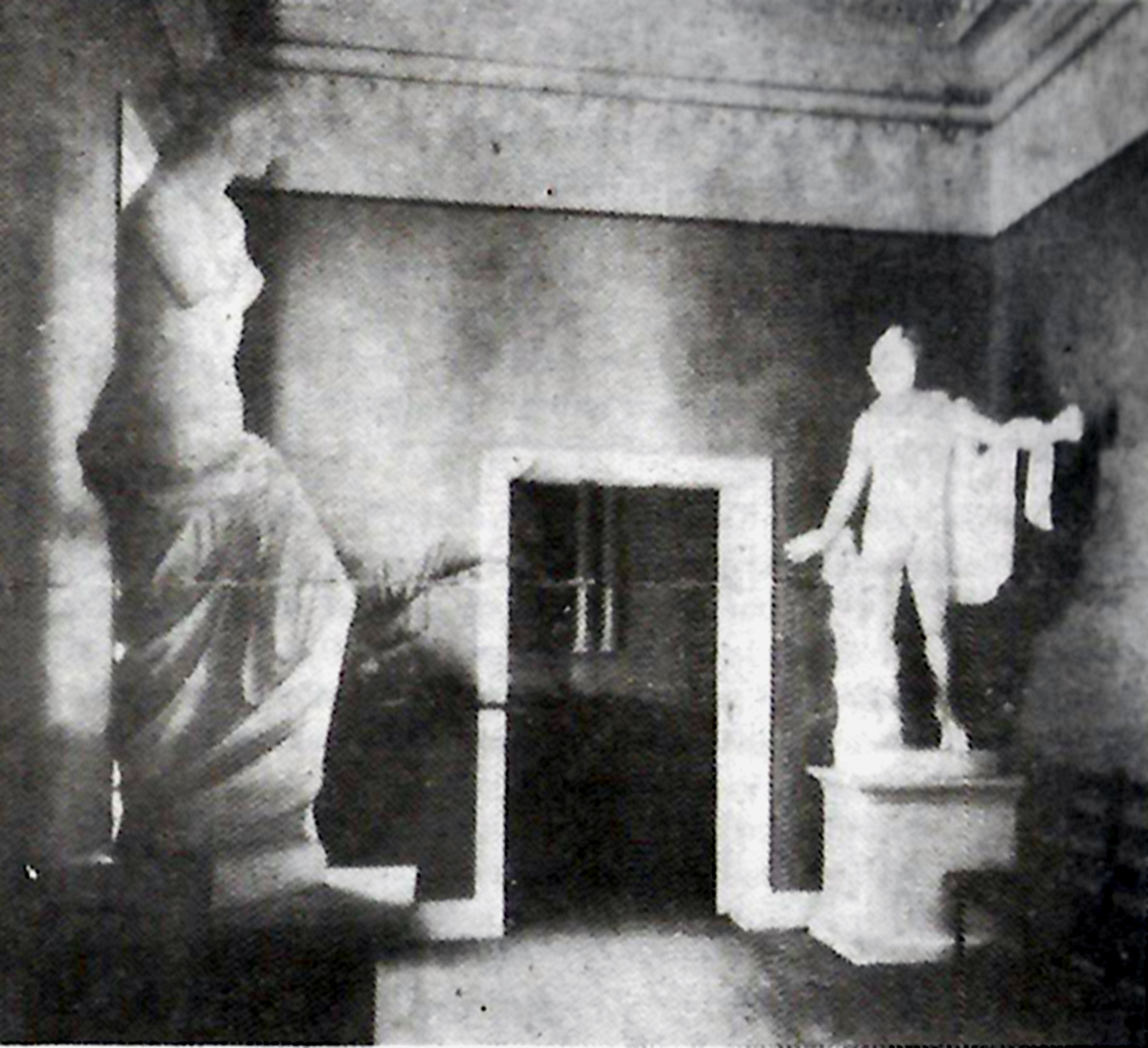 Estátuas de Vênus e Apolo no saguão do antigo Instituto de Artes da UFRGS